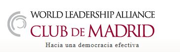 Logotipo del Club de Madrid